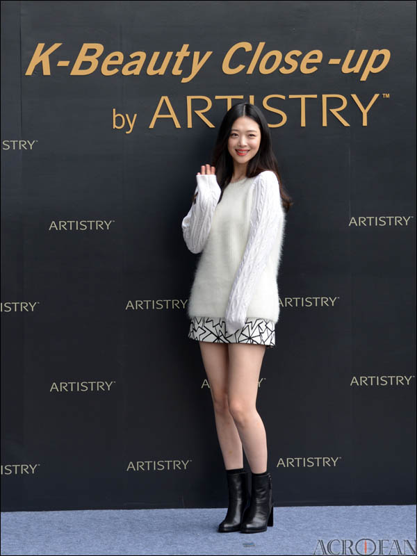 K-뷰티 클로즈업 바이 아티스트리 행사 현장